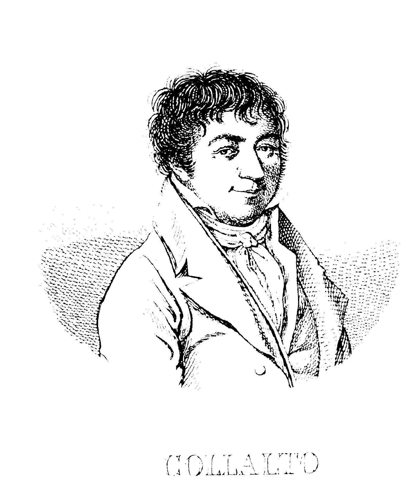 Antonio Collalto (1765 – 1820)